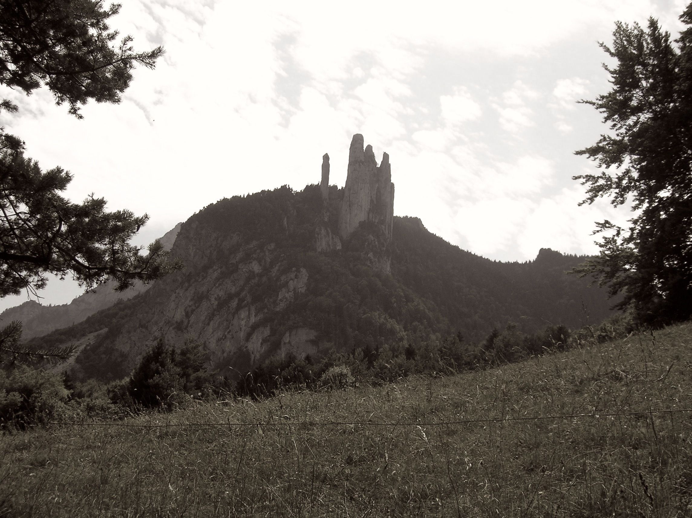 Saint-Nizier-du-Moucherotte